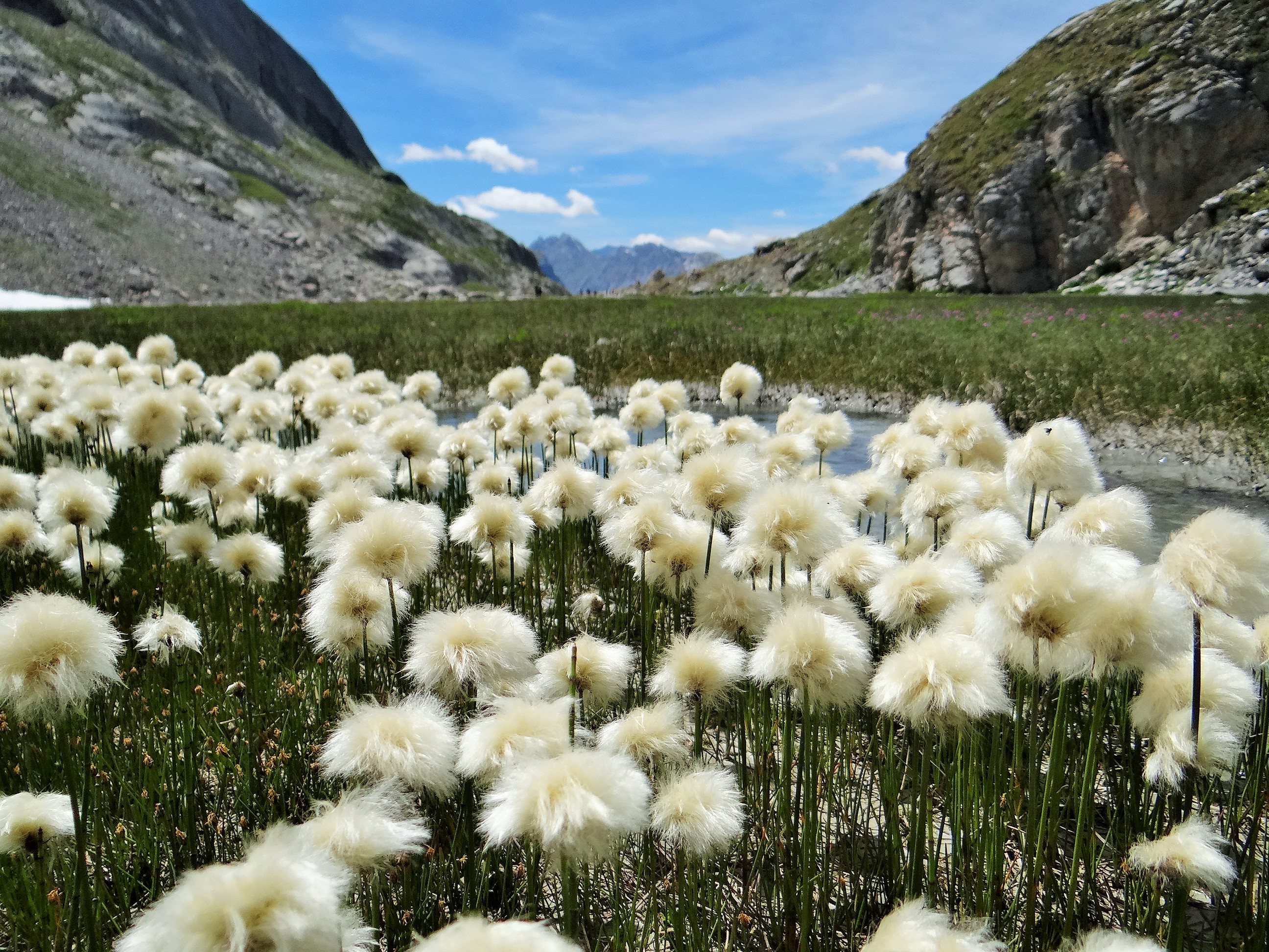 Parc national de la Vanoise